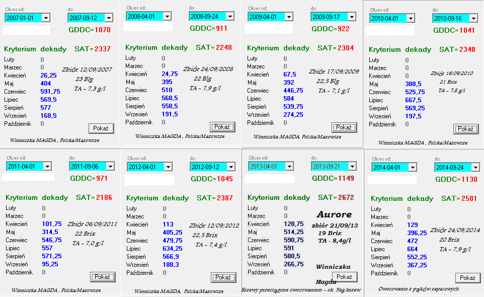 Aurore - parametry dojrzewania 2007-2014